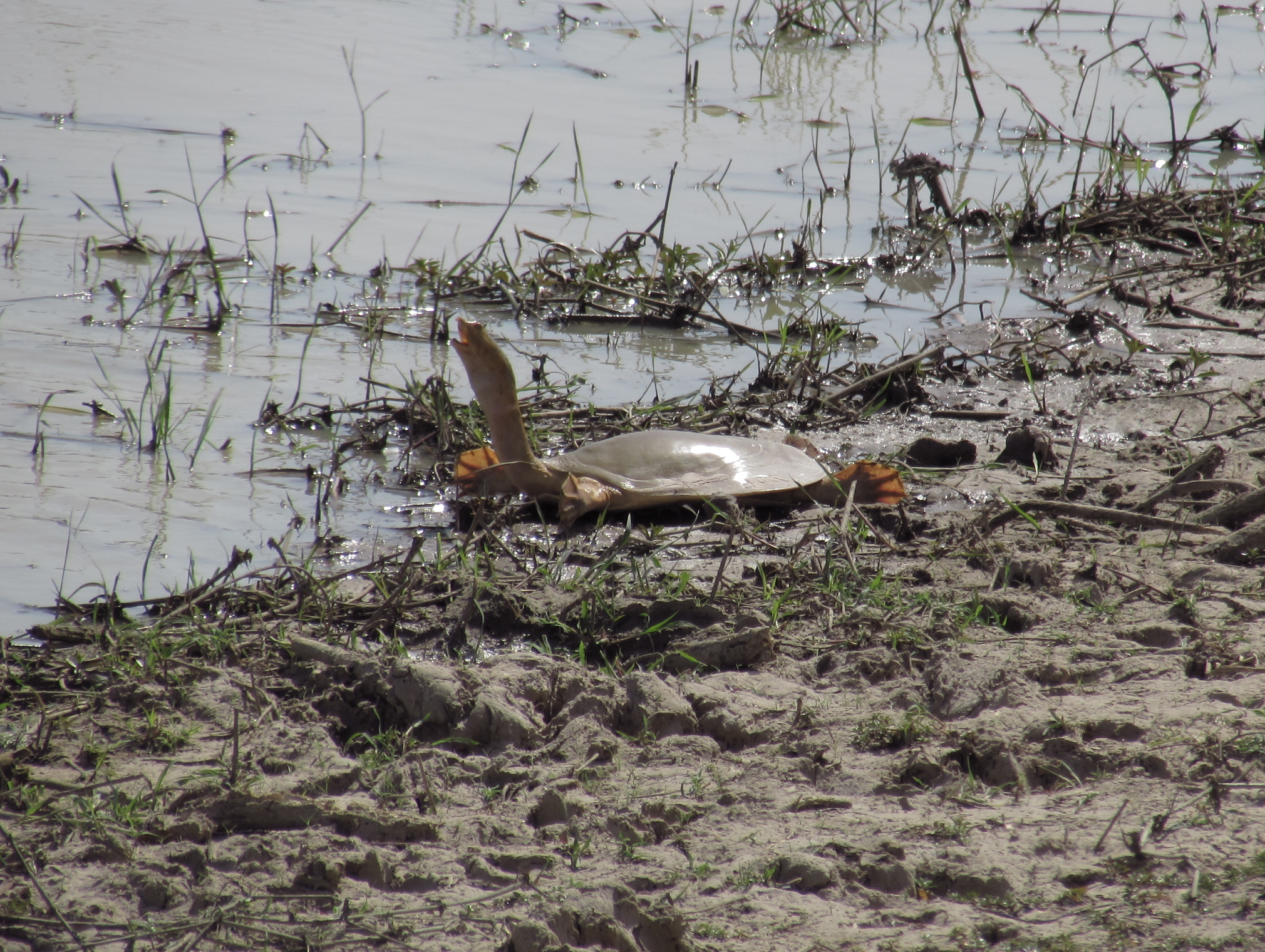 nationalpark pendjari - weichschildkröte der gattung cyclanorbis am mare bali